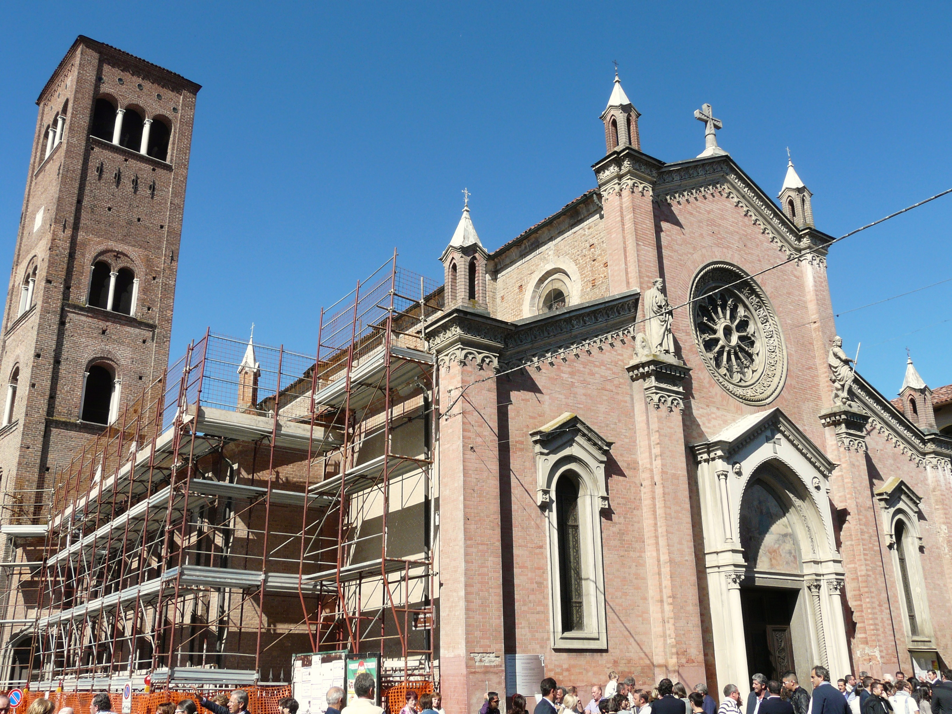 Chiesa dei Santi Michele e Pietro, Cavallermaggiore, Piemonte, Italia